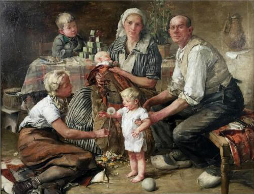 Familienbild, vor 1939 (ca. 1938) Große Deutsche Kunstausstellung 1939, Raum 15. XXII. Biennale von Venedig, 1940. KdF-Ausstellung Hamburg 1938. 2. Preis im Wettbewerb "Das Familienbild", ausgeschrieben durch Alfred Rosenberg. "Artige Kunst". Kunst und Politik im Nationalsozialismus, Bochum/Rostock/Regeensburg 2016-2017